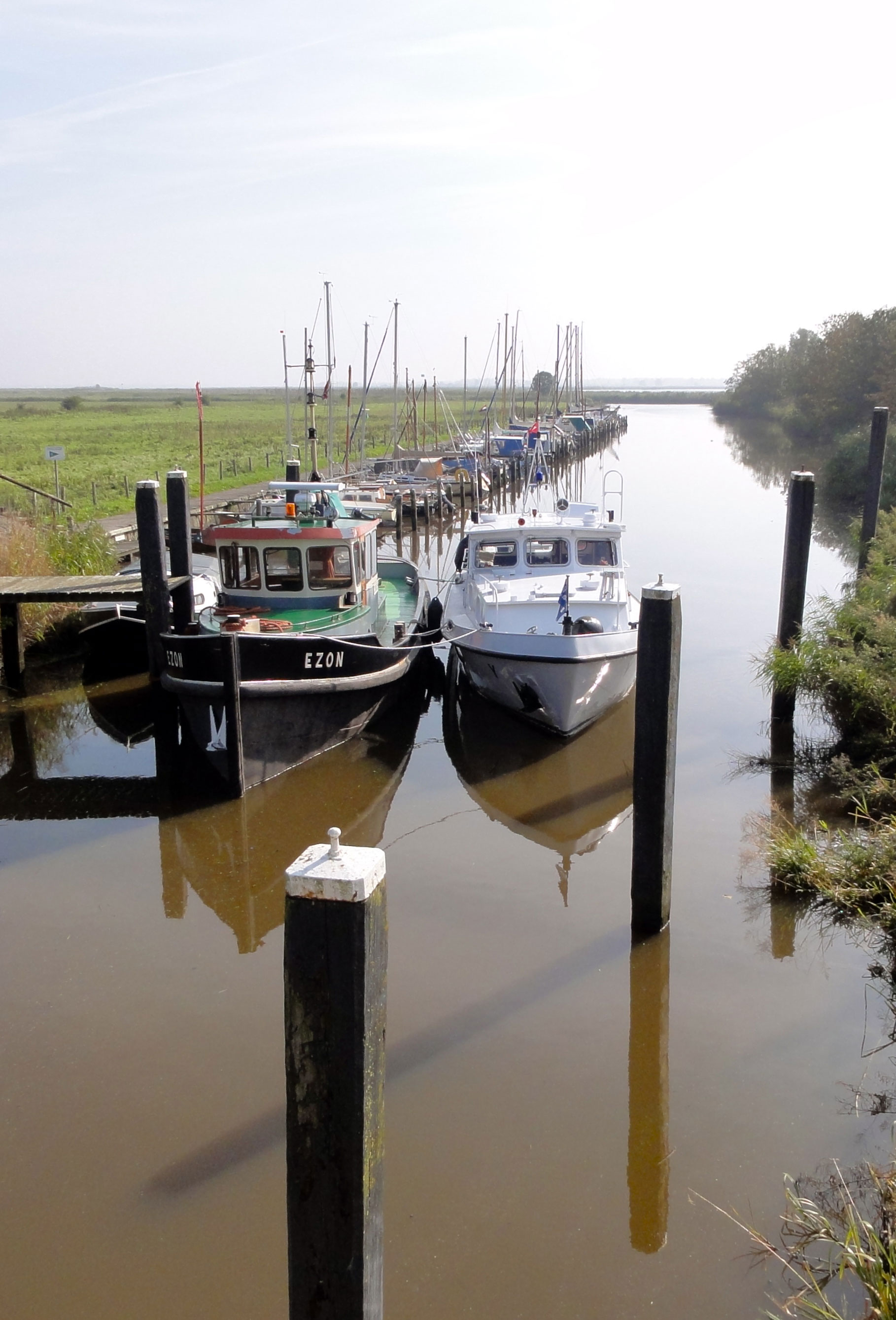 Sluis Ezumazijl